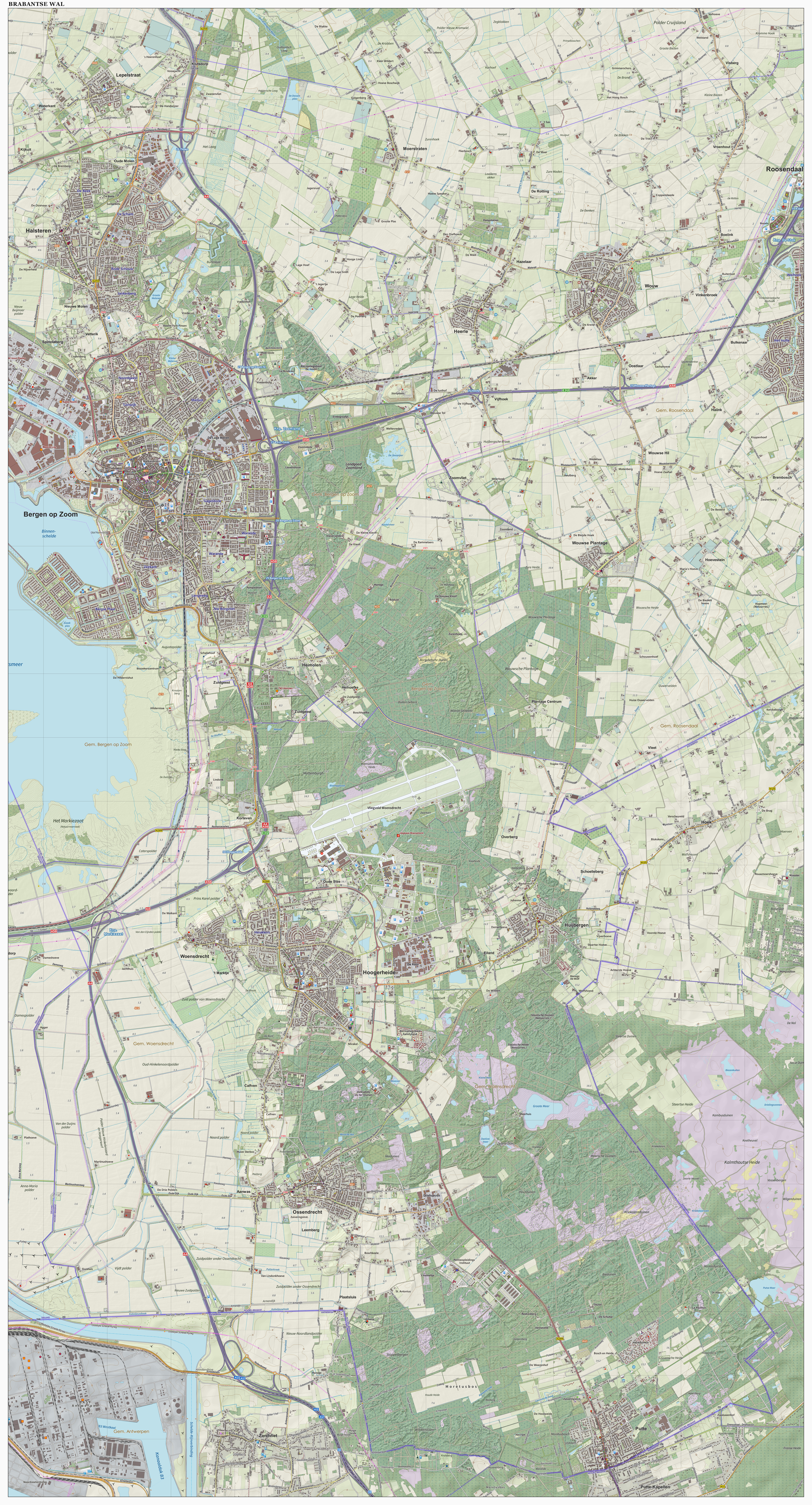 Topografische kaart van de Brabantse Wal (natuurgebied). Resolutie: 400 pixels/km. Samengesteld door Jan-Willem van Aalst op basis van de GML open geodata van de BRT/Top10NL (basisregistratie Topografie, Kadaster), vrijgegeven door Kadaster onder de Creative Commons BY licentie. Additionele gegevens uit BAG uit de Open Street Map en uit de Risicokaart. Zie ook de Legenda.